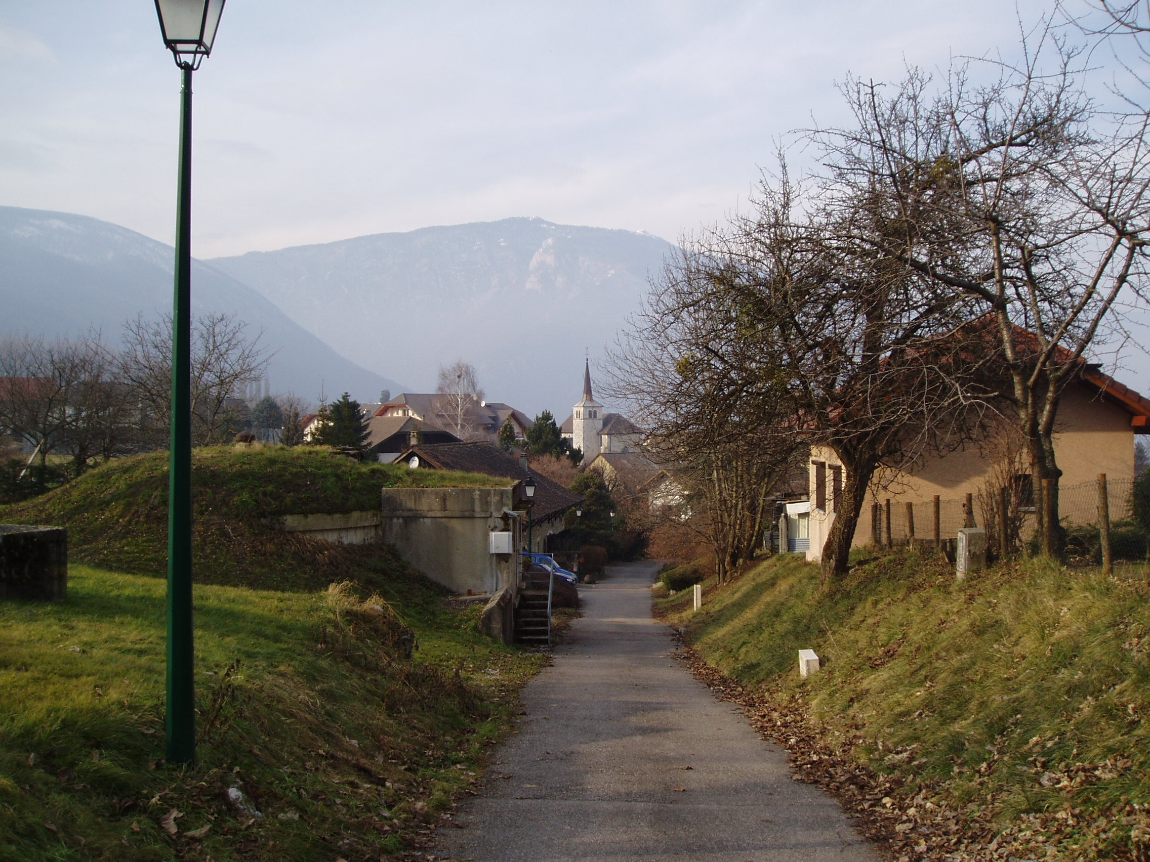 Vue de Vulbens